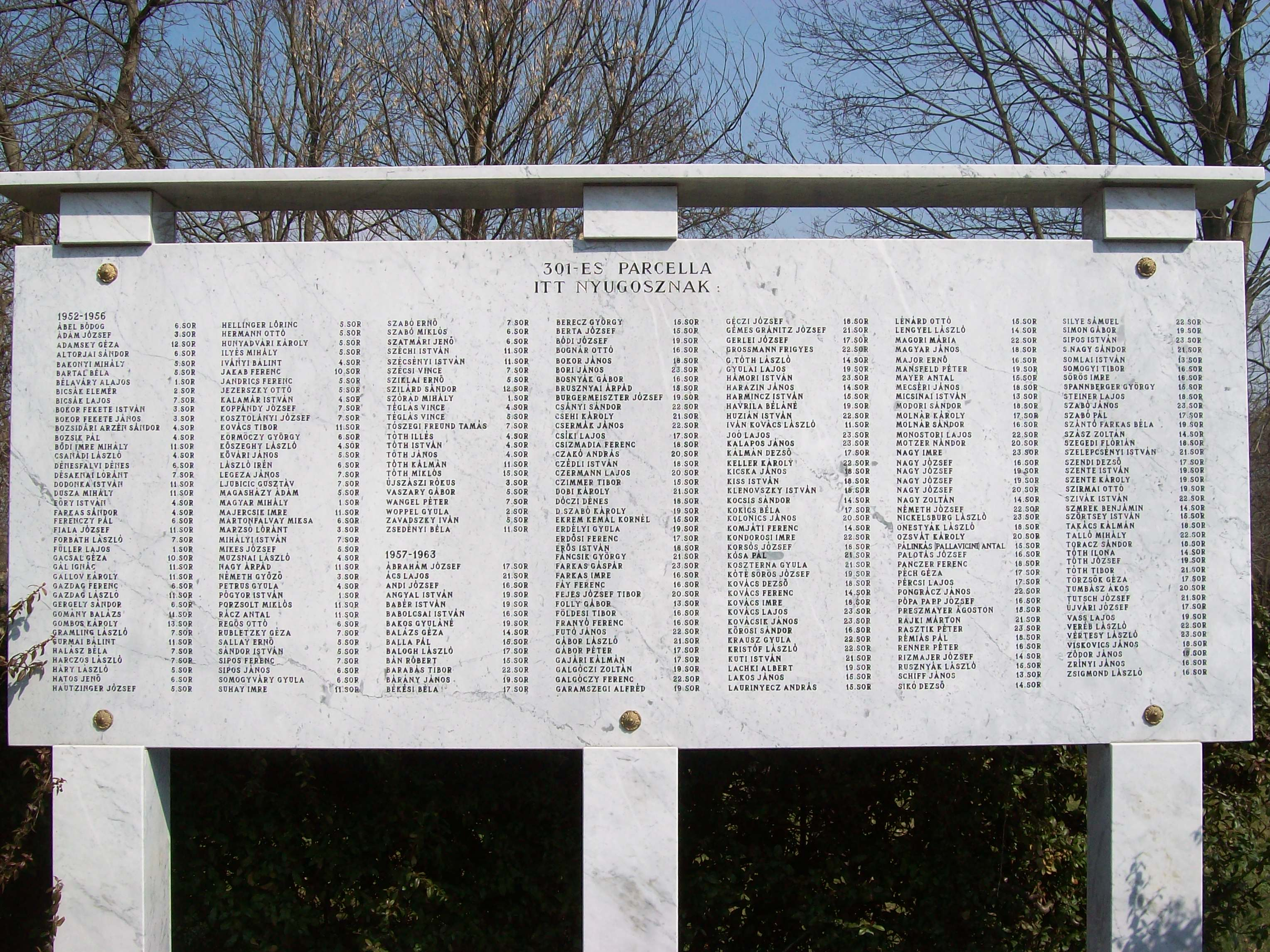 301-es parcella, márványtábla